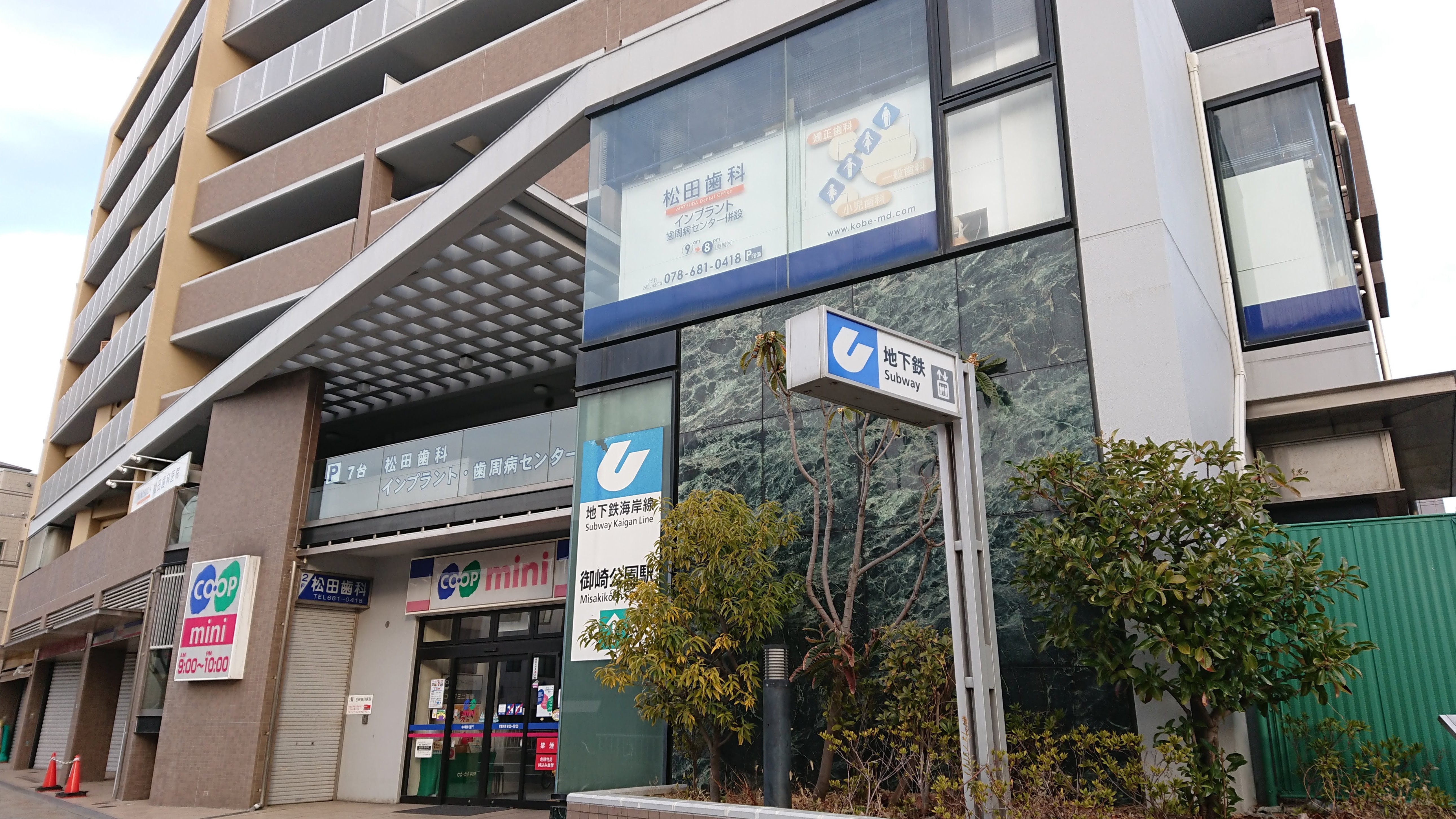 神戸市交通局（神戸市営地下鉄）海岸線 K07 御崎公園駅 出口2